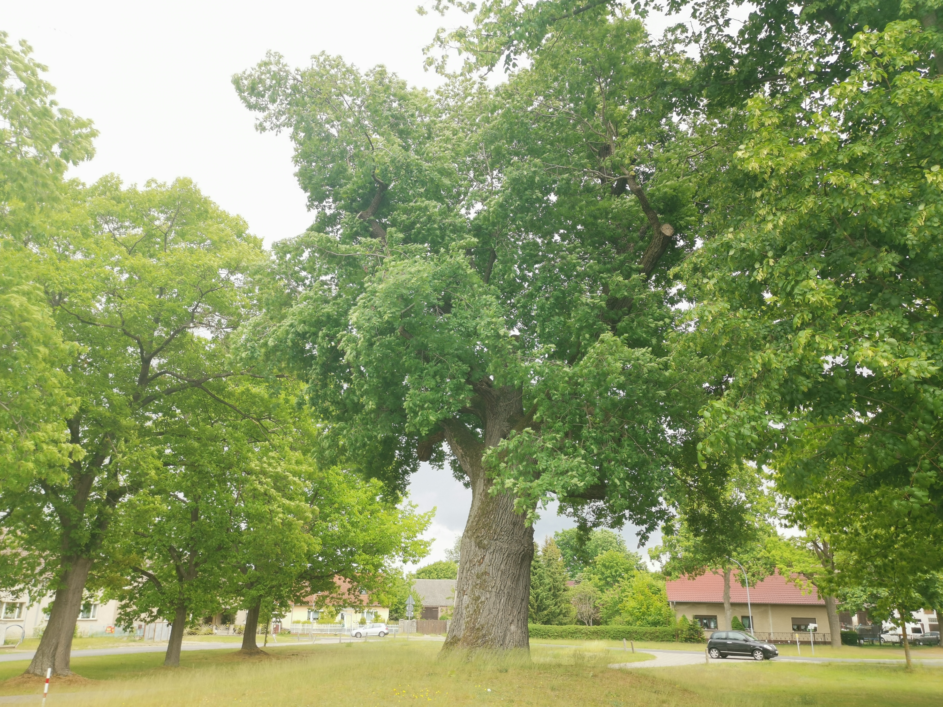 Als Naturdenkmal geschützte Stieleiche in Bugk